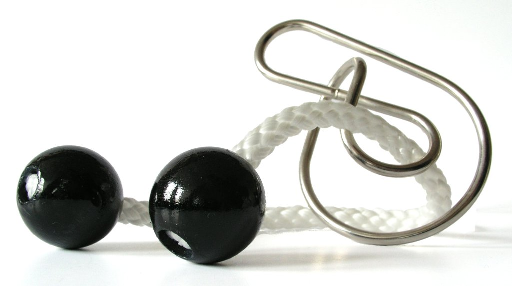 Entwirrpuzzle